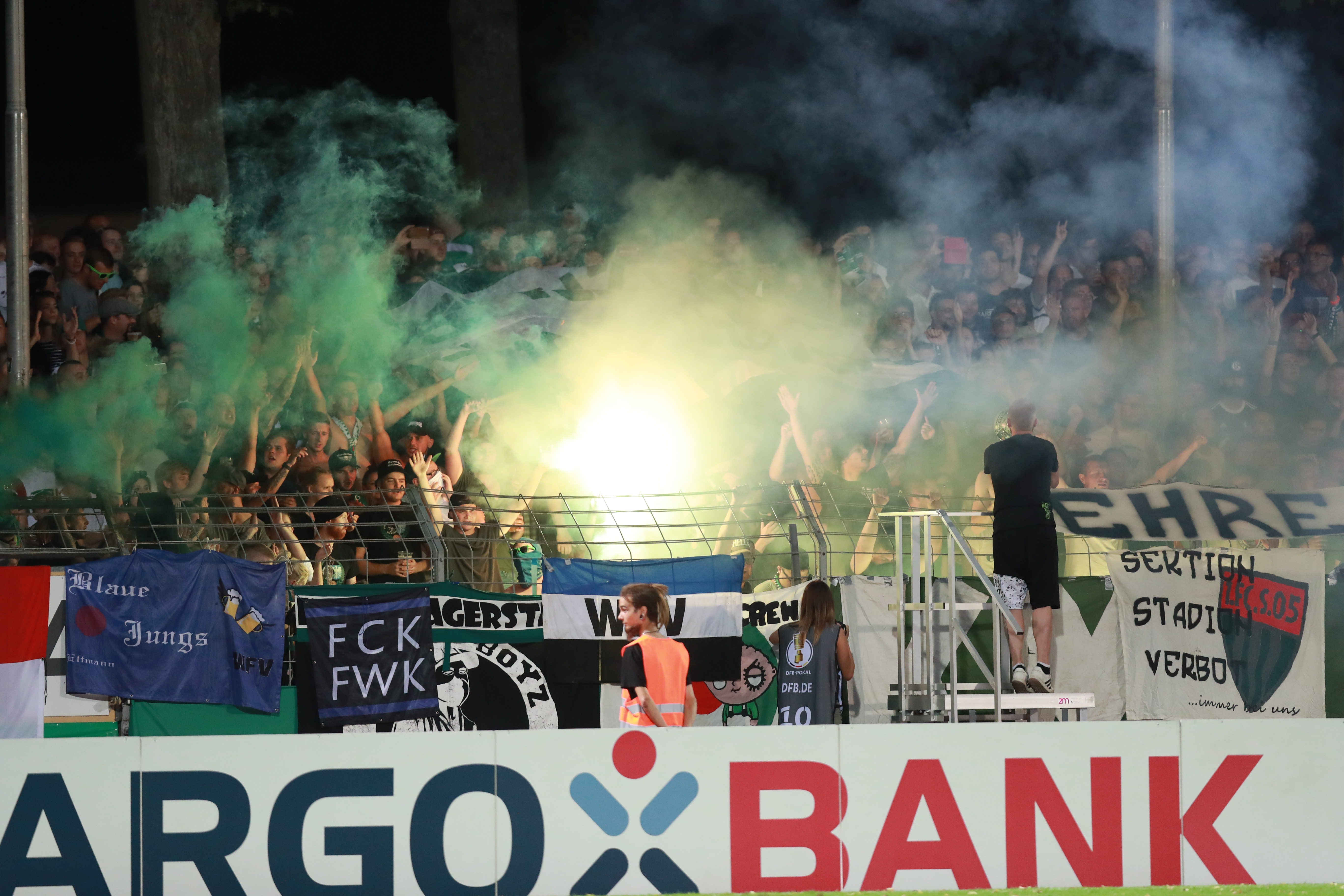 DFB-Pokal 2018/19, 1. Hauptrunde: 1. FC Schweinfurt 05 gegen FC Schalke 04 0:2 (0:1)